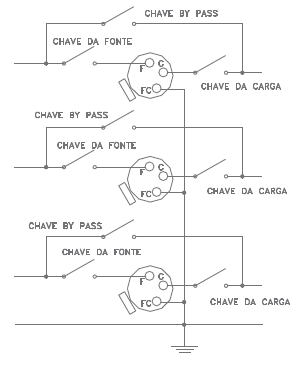 Diagrama RT estrela